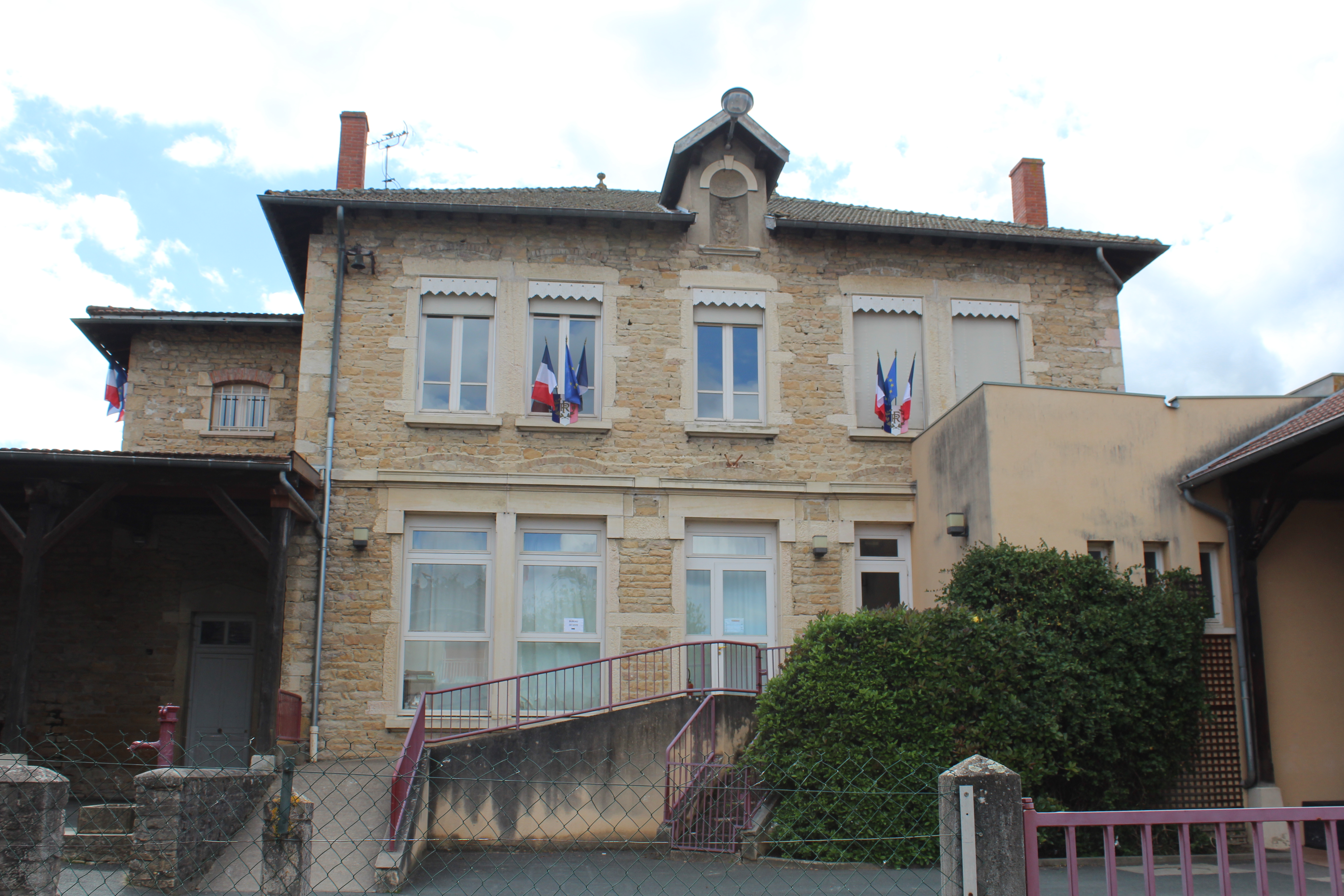 Mairie de Mogneneins.